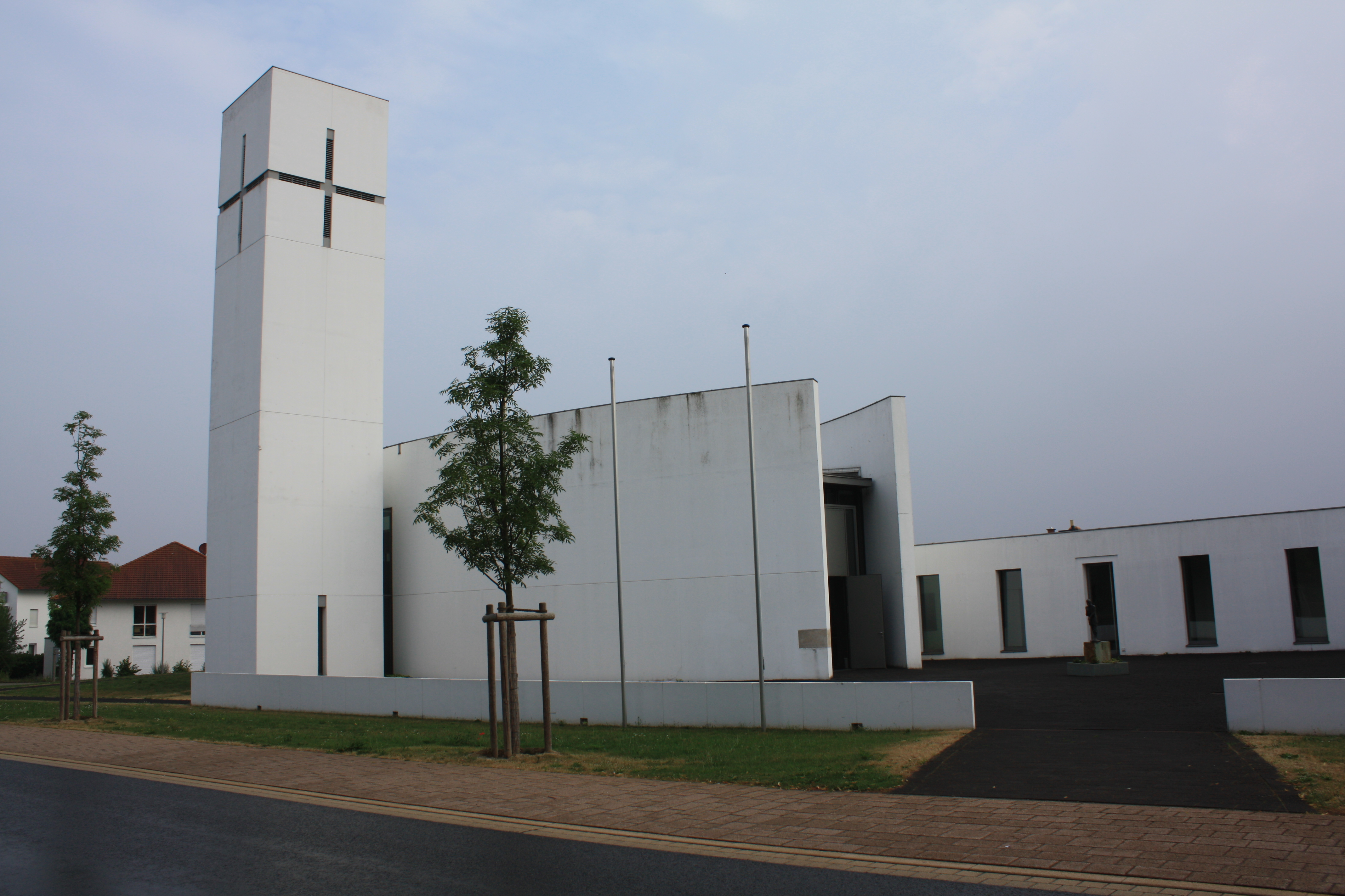 katholische St. Johannis Baptist-Kirche in Leopoldshöhe